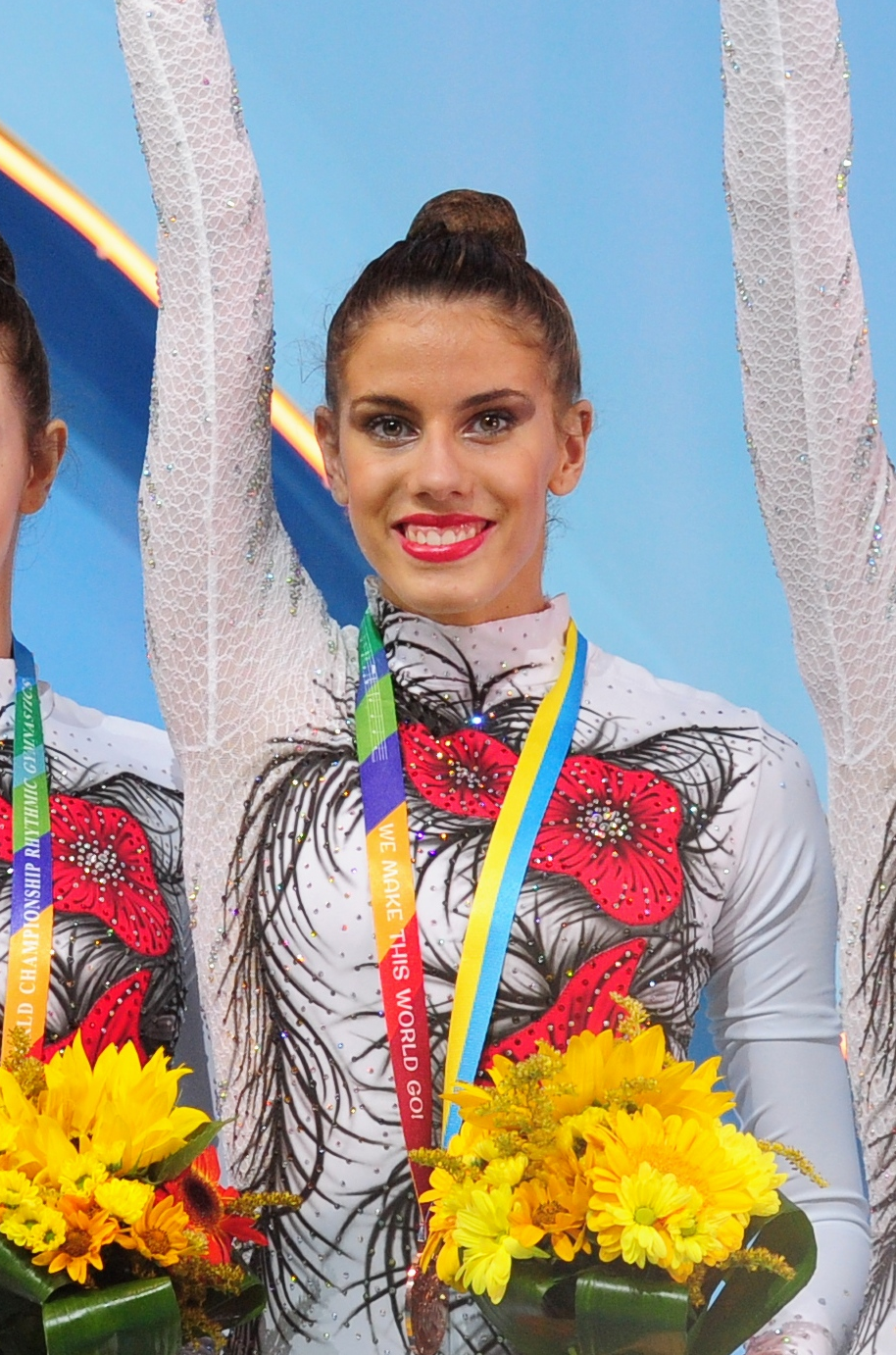 Lourdes Mohedano con la medalla de bronce en el podio de la final de 3 pelotas y 2 cintas en el Campeonato Mundial de Kiev en 2013.